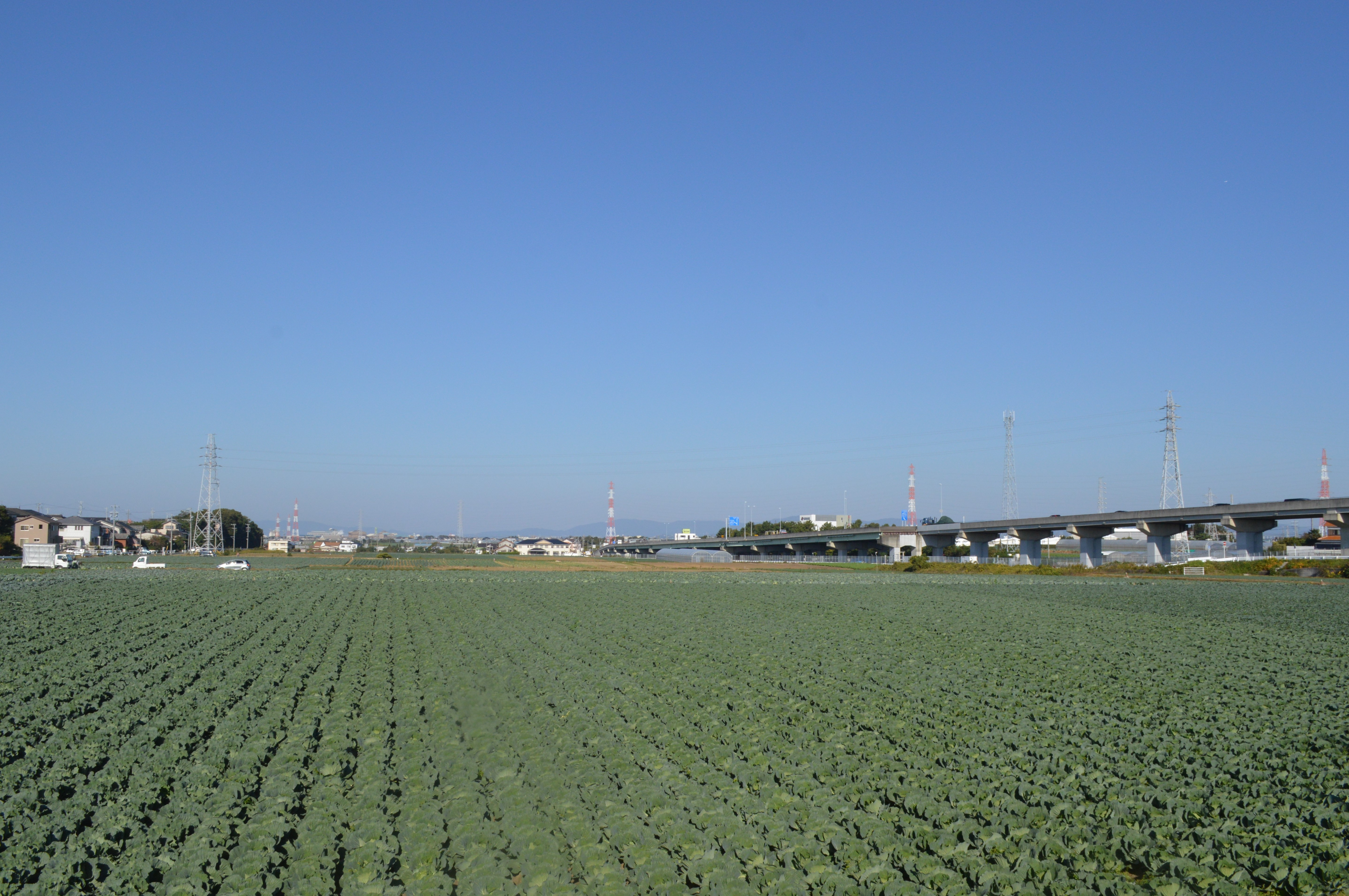 愛知県豊橋市大清水町にあるキャベツ畑。右端は国道23号線の高架道路。大清水まなび交流館「ミナクル」の西約100m地点、愛知県道409号線の歩道から西を向いて撮影。